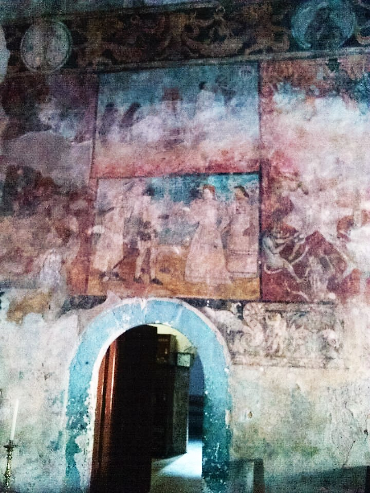 Santa Maria Xoxoteco , Mezquititlan Hgo.